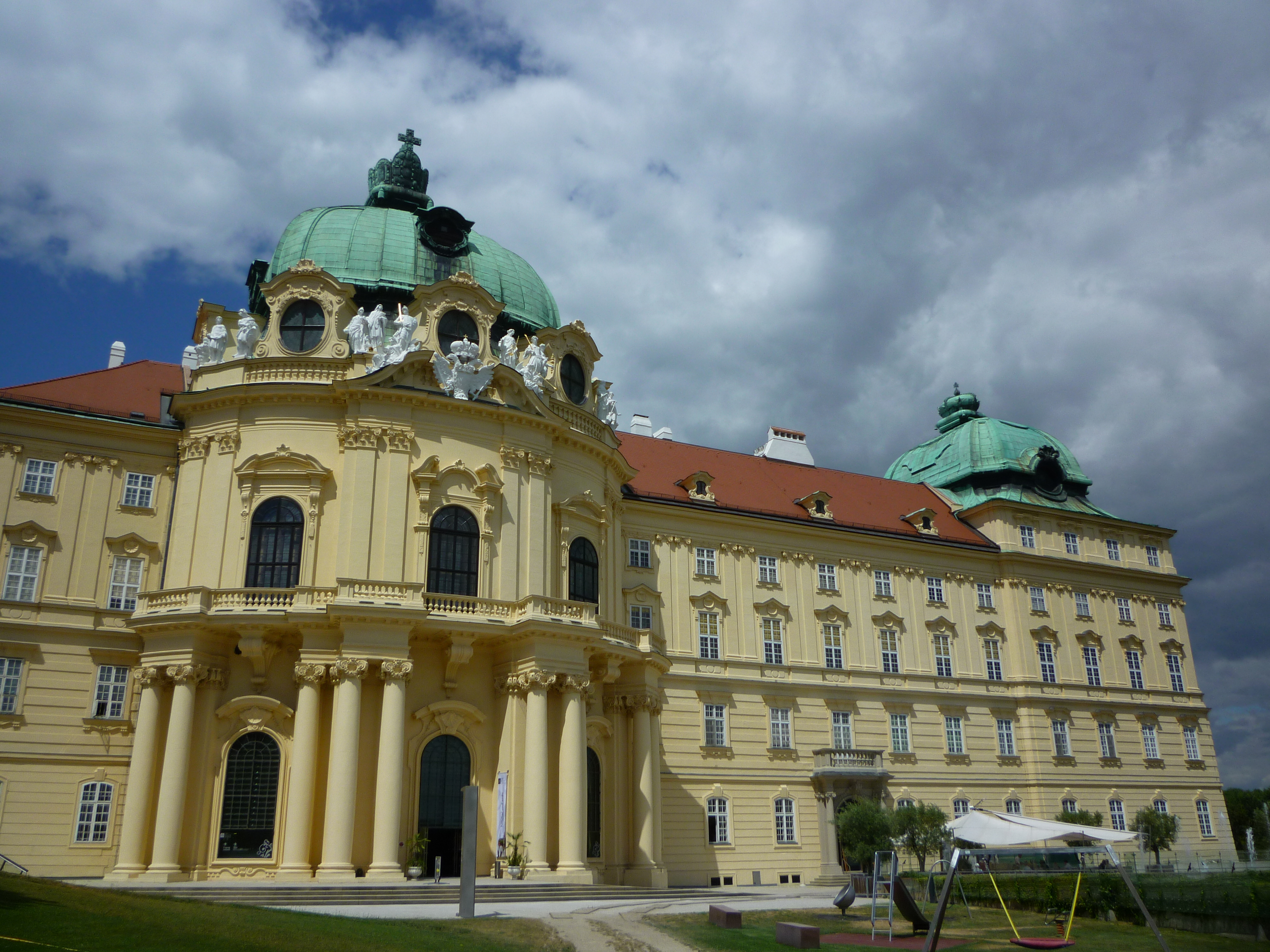 Kaisertrakt von Stift Klosterneuburg von Osten